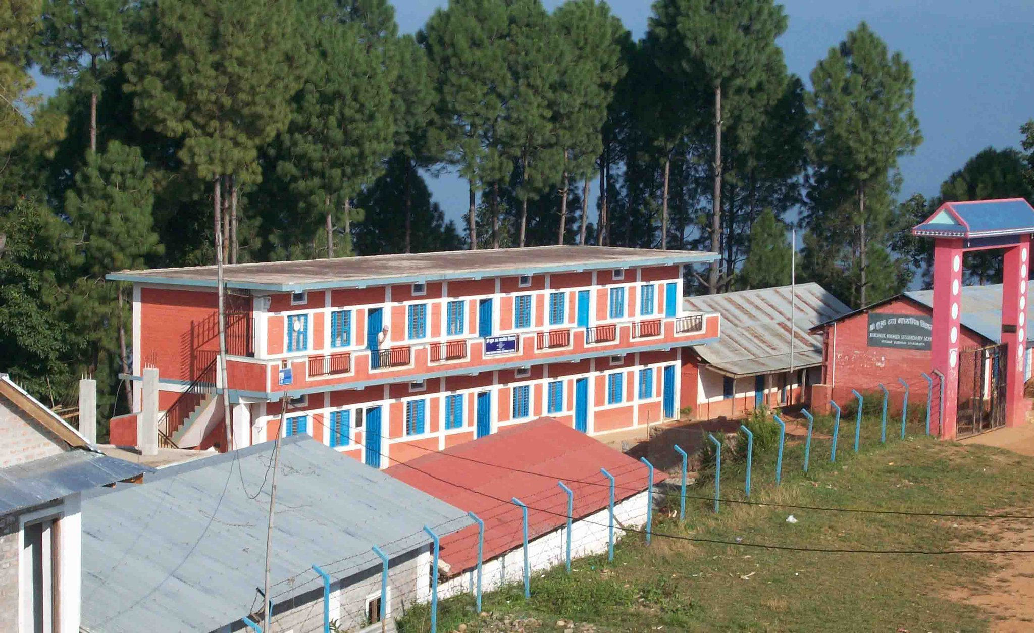 नेपाली: जिल्लाको मौनाबुधुक गाविसको बुधुक उच्च मावि ।